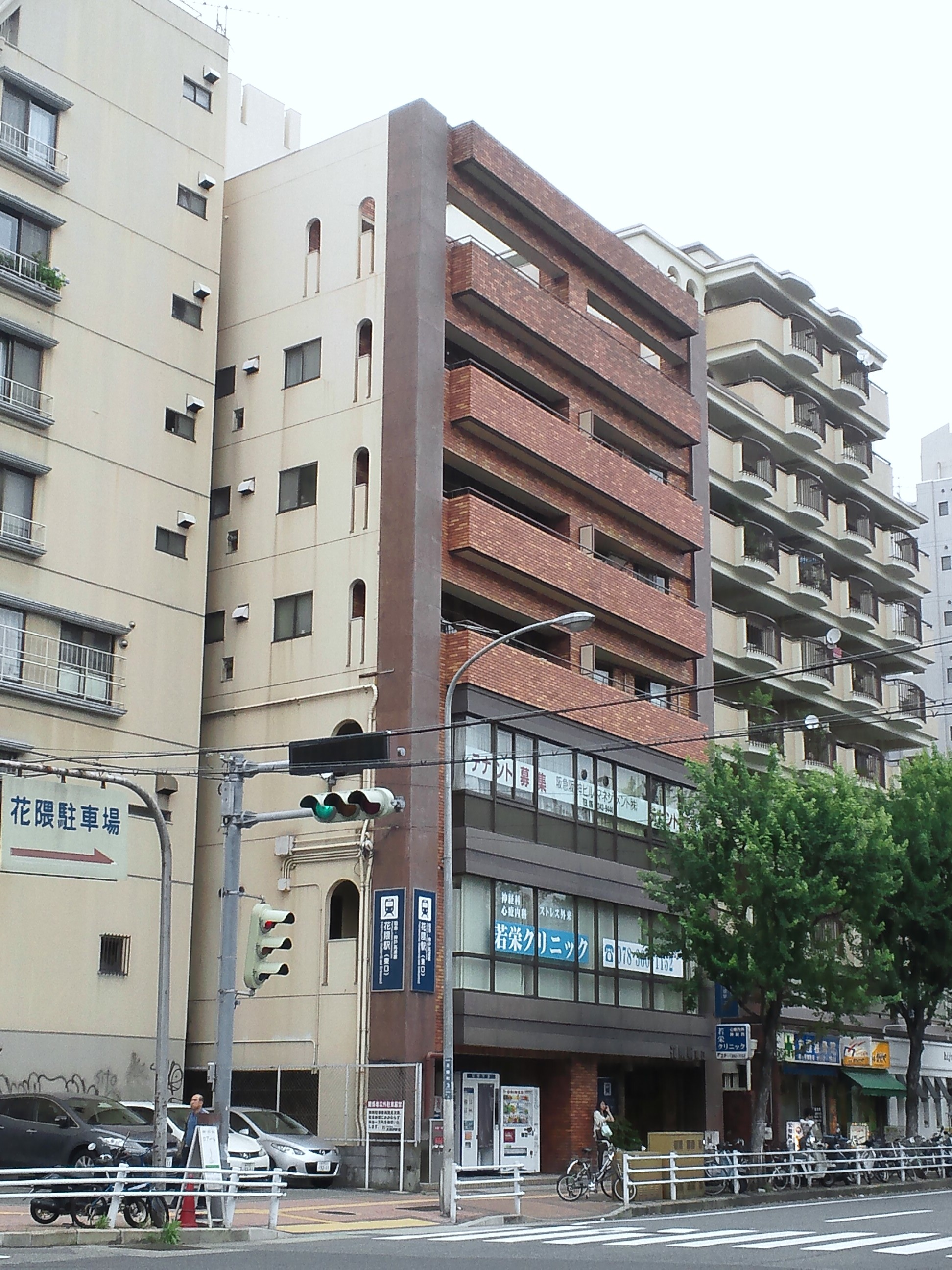 阪急花隈駅